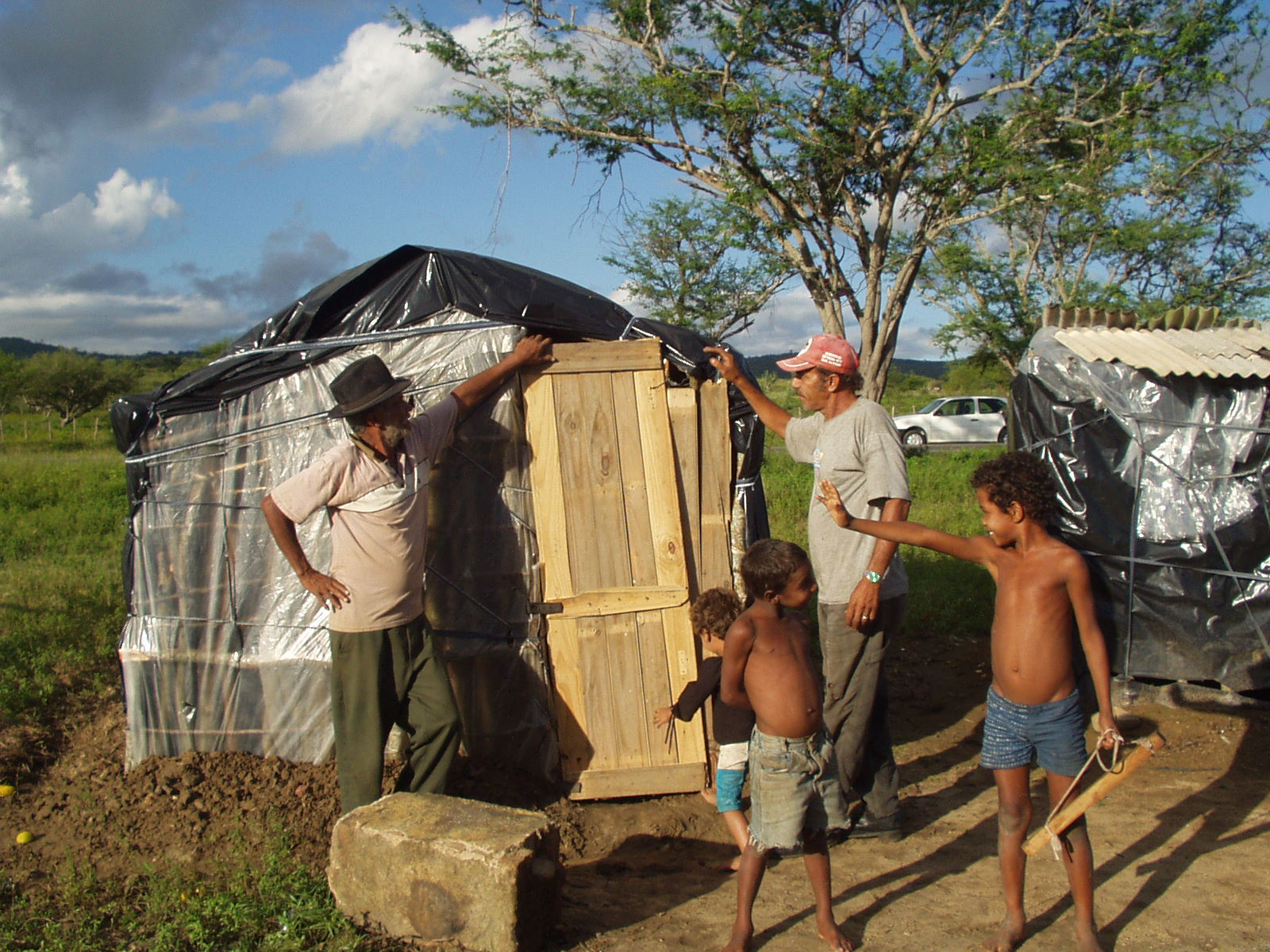 Occupation par des paysans Sans-Terre: construction sommaire. Auteur: Julien Vandeburie